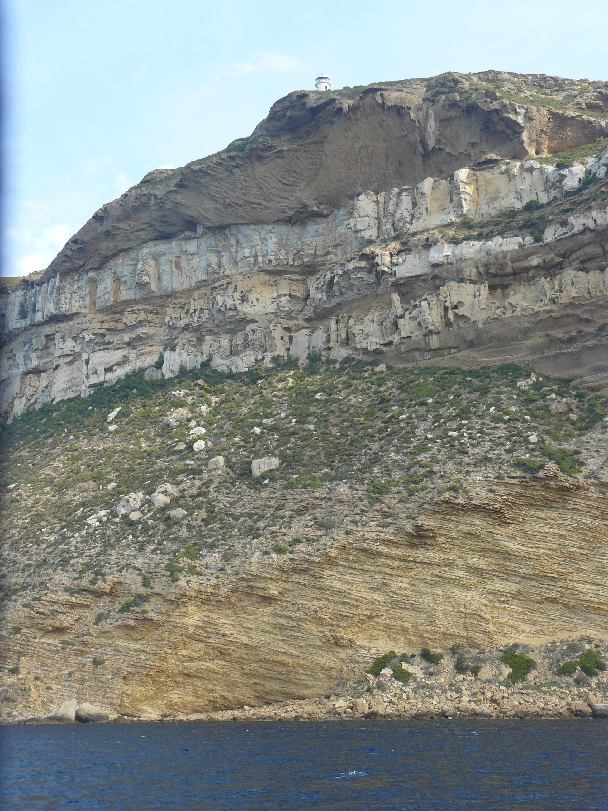 Falaises de Soubeyrannes, entre Cassis et La Ciotat, vues de la mer, en haut, le sémaphore du Bec de l'Aigle.